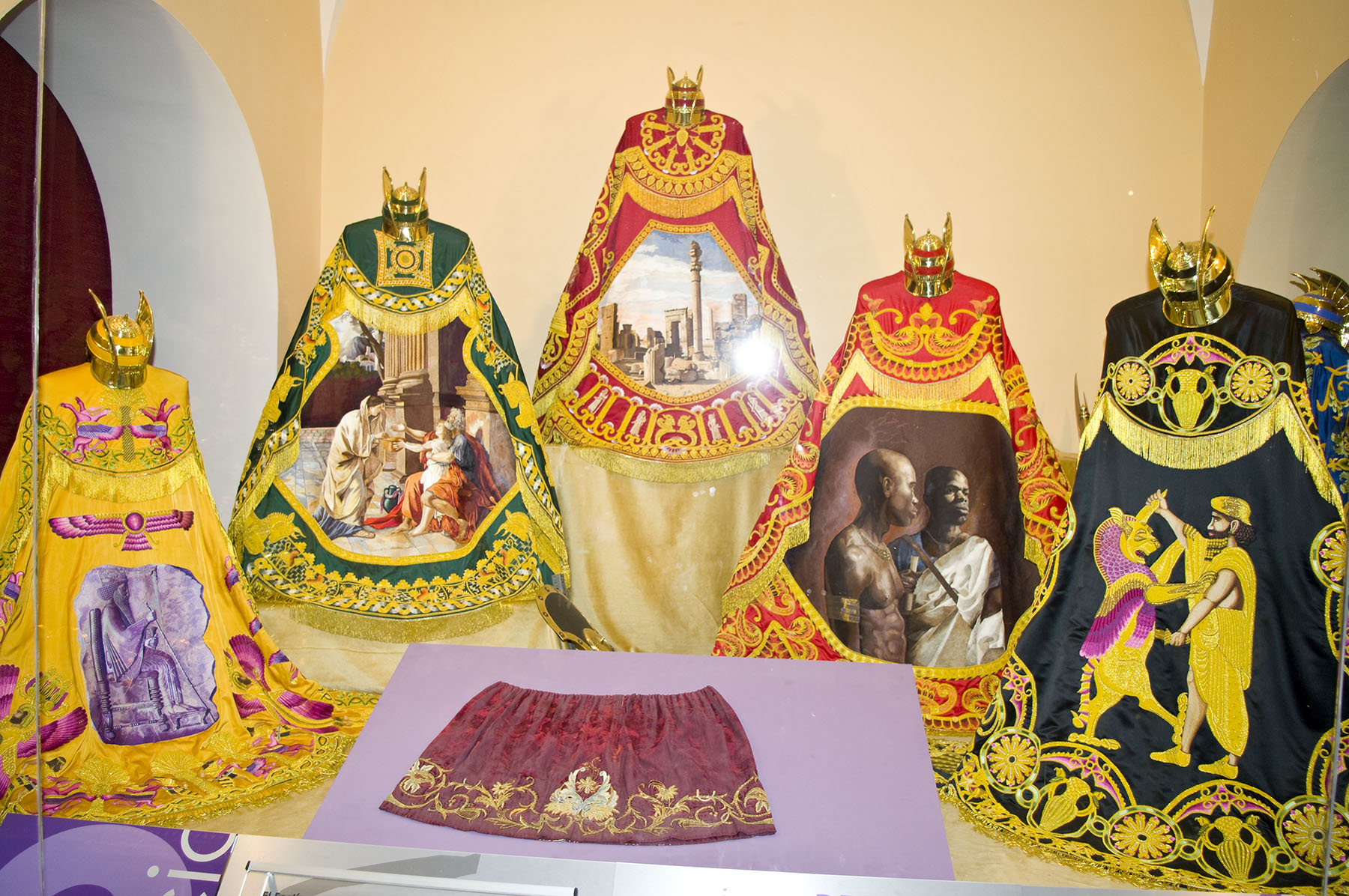 Museo de bordados del Paso Blanco en Lorca (Murcia)